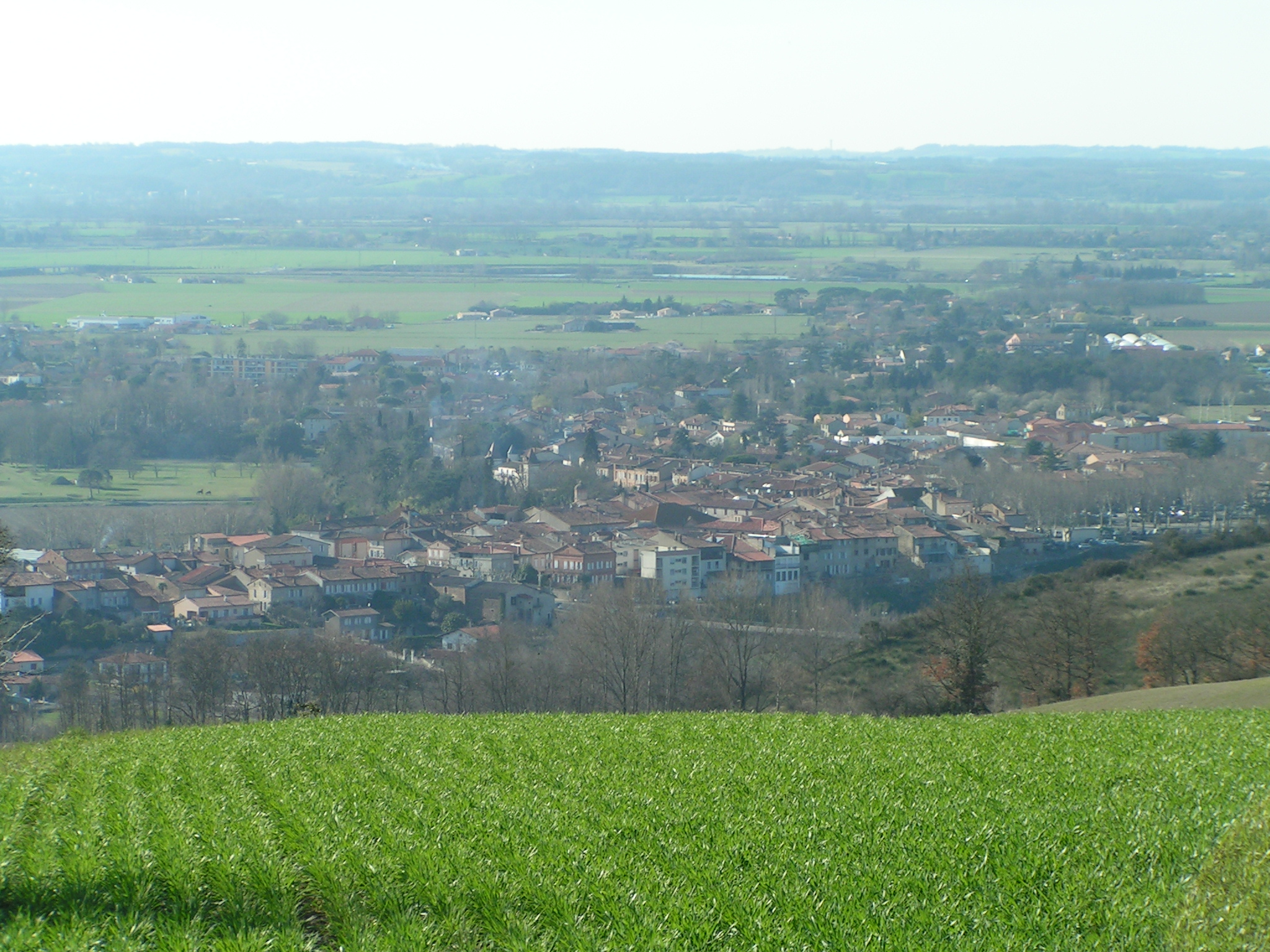 Description Ville de Carbonne DateSourceOwn workAuthorPaternel 1 Catégorie:Carbonne Ville de Carbonne